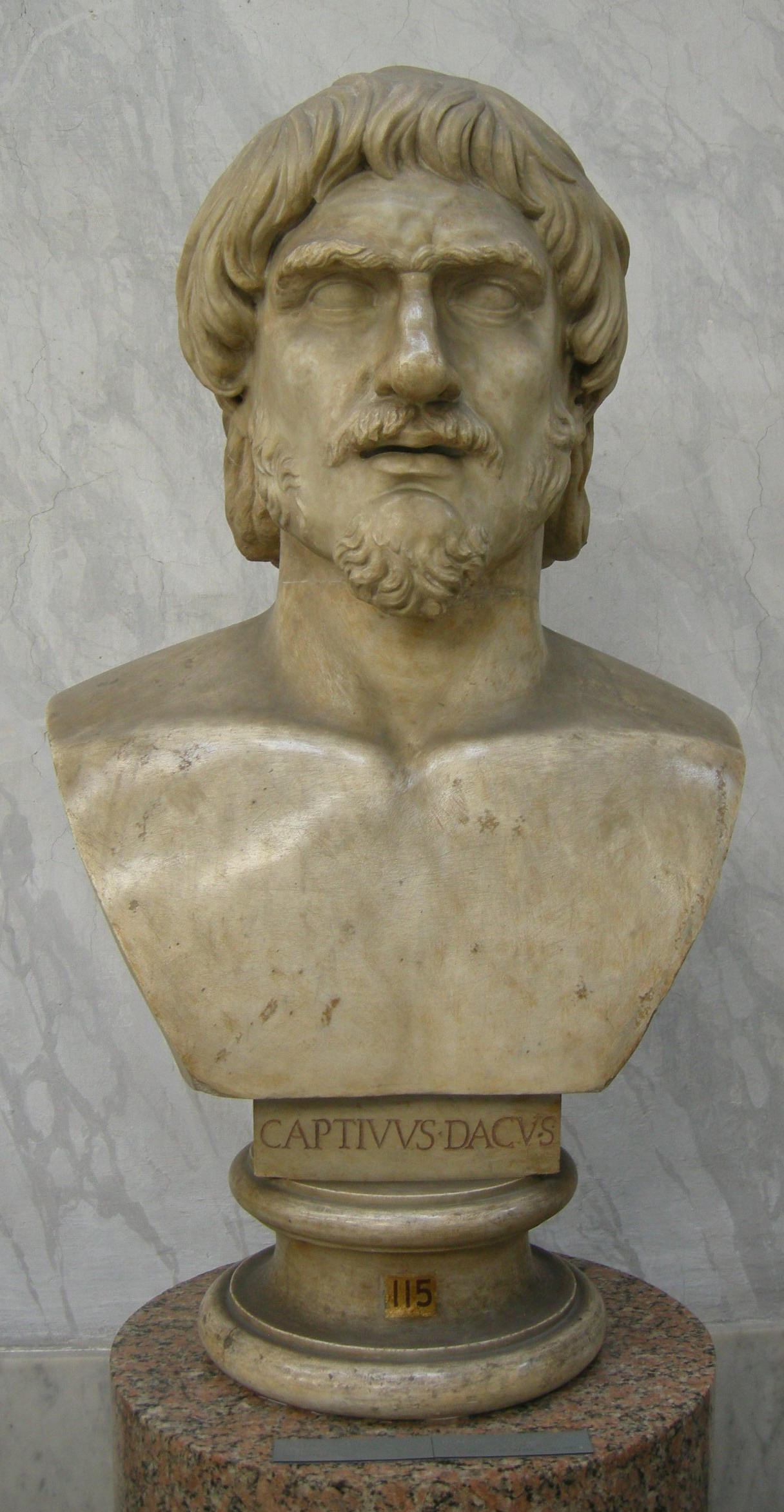 Testa di dace dal porto di Traiano ([Ostia Antica ). Musei Vaticani, Museo Chiaramonti - Braccio Nuovo; inv. 2220.